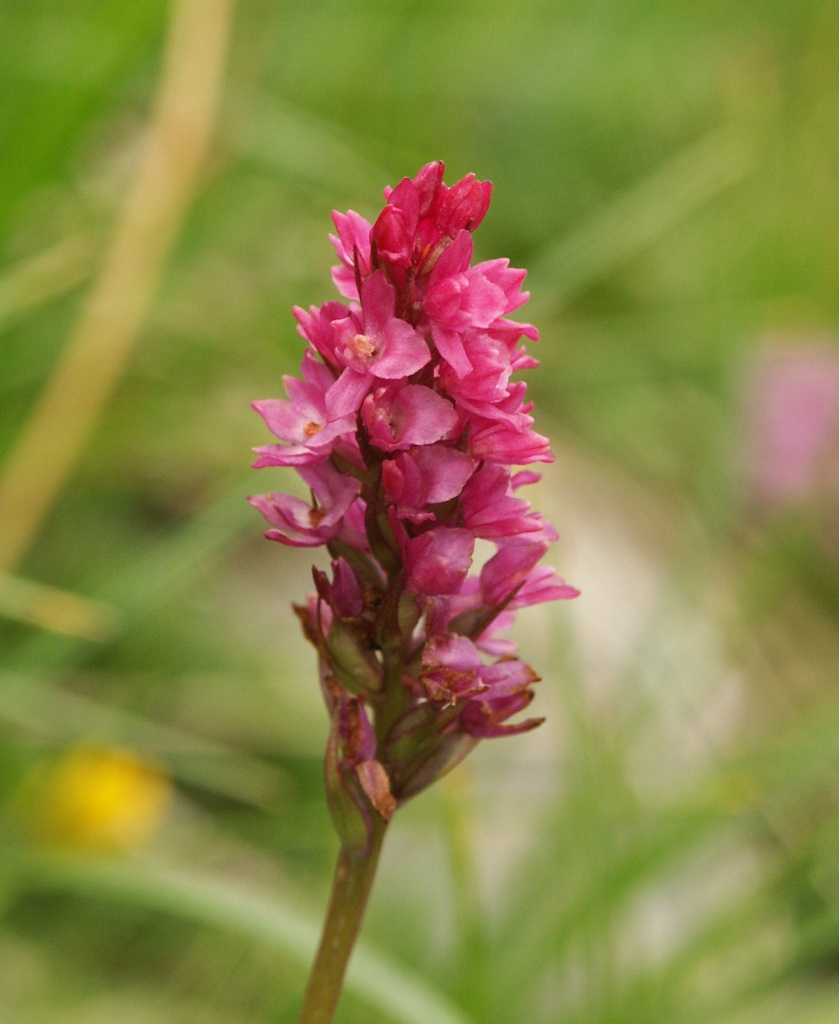 Gymnadenia × heufleri, Berchtesgadener Alpen, Germany